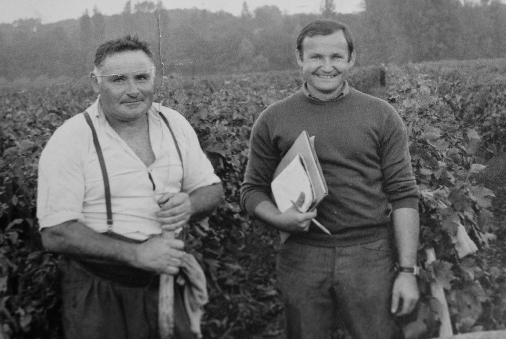 Pierre Bourotte